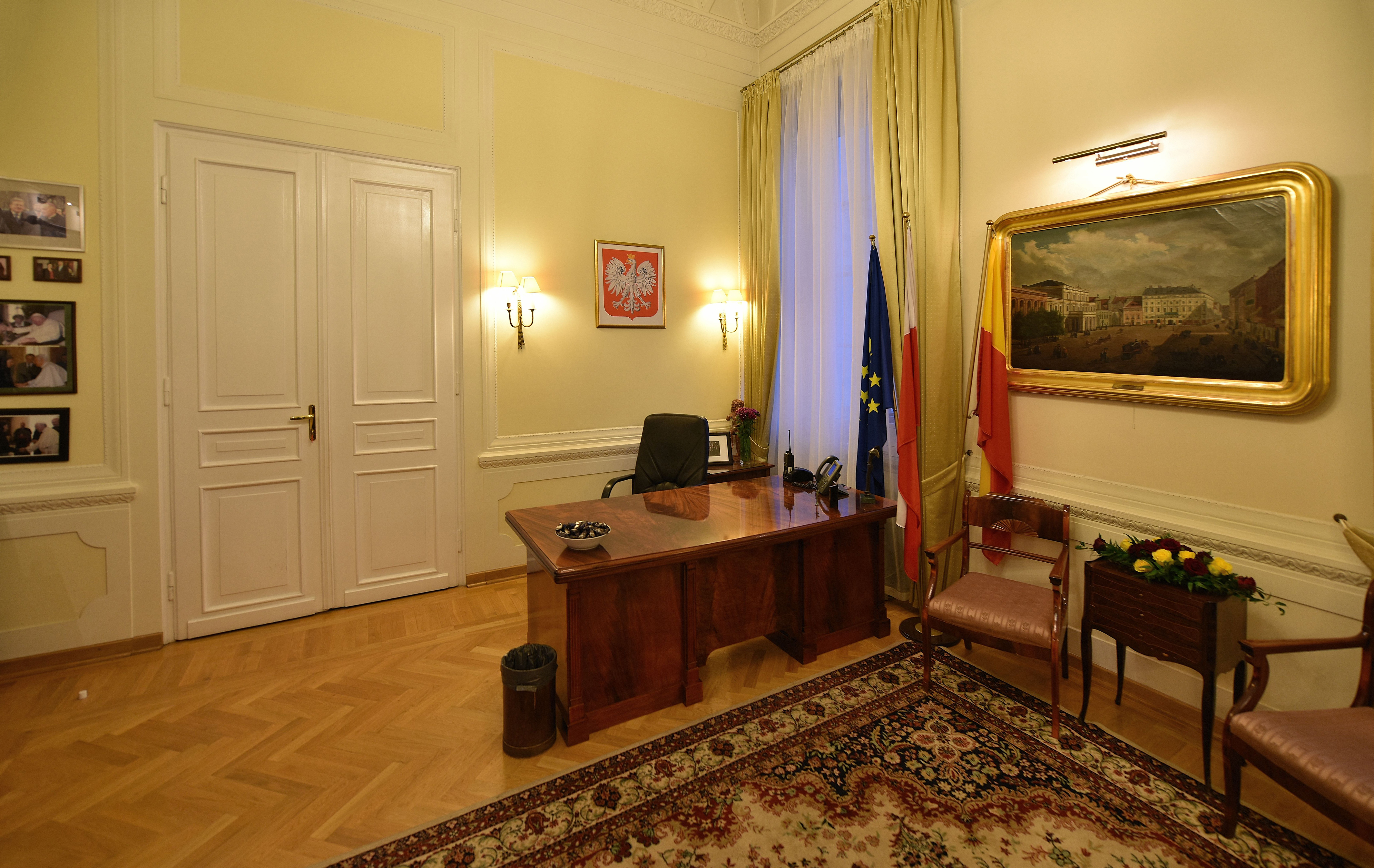 Gabinet prezydenta Warszawy w pałacu Komisji Rządowej Przychodów i Skarbu w Warszawie